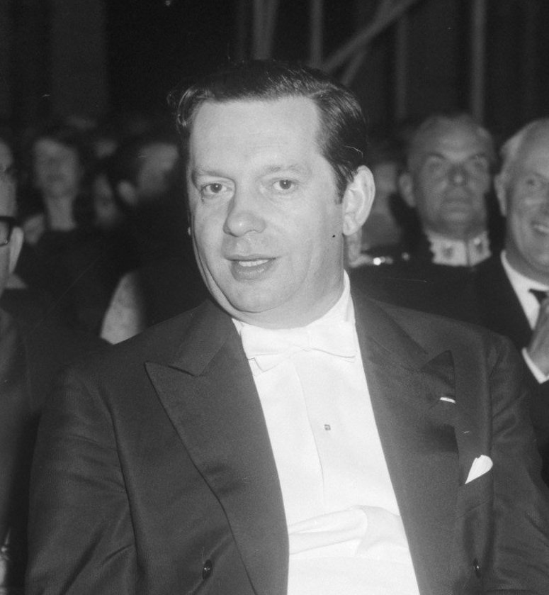 Collectie / Archief : Fotocollectie Anefo Reportage / Serie : Grand Gala du Disque Classique 1965 in het Concertgebouw te Amsterdam Beschrijving : Vier Edison-winnaars; v.l.n.r. violisten Herman Krebbers en Arthur Grumiaux, dirigent Carlo Maria Giulini en mevrouw Soames (dochter van Winston Churchill) Datum : 29 oktober 1965 Locatie : Amsterdam, Noord-Holland Trefwoorden : klassieke muziek, musici, onderscheidingen, prijsuitreikingen Persoonsnaam : Giulini, Carlo Maria, Grumiaux, Arthur, Krebbers, Herman, Soames, Mary Fotograaf : Bilsen, Joop van / Anefo Auteursrechthebbende : Nationaal Archief Materiaalsoort : Negatief (zwart/wit) Nummer archiefinventaris : bekijk toegang 2.24.01.04 Bestanddeelnummer : 918-3832